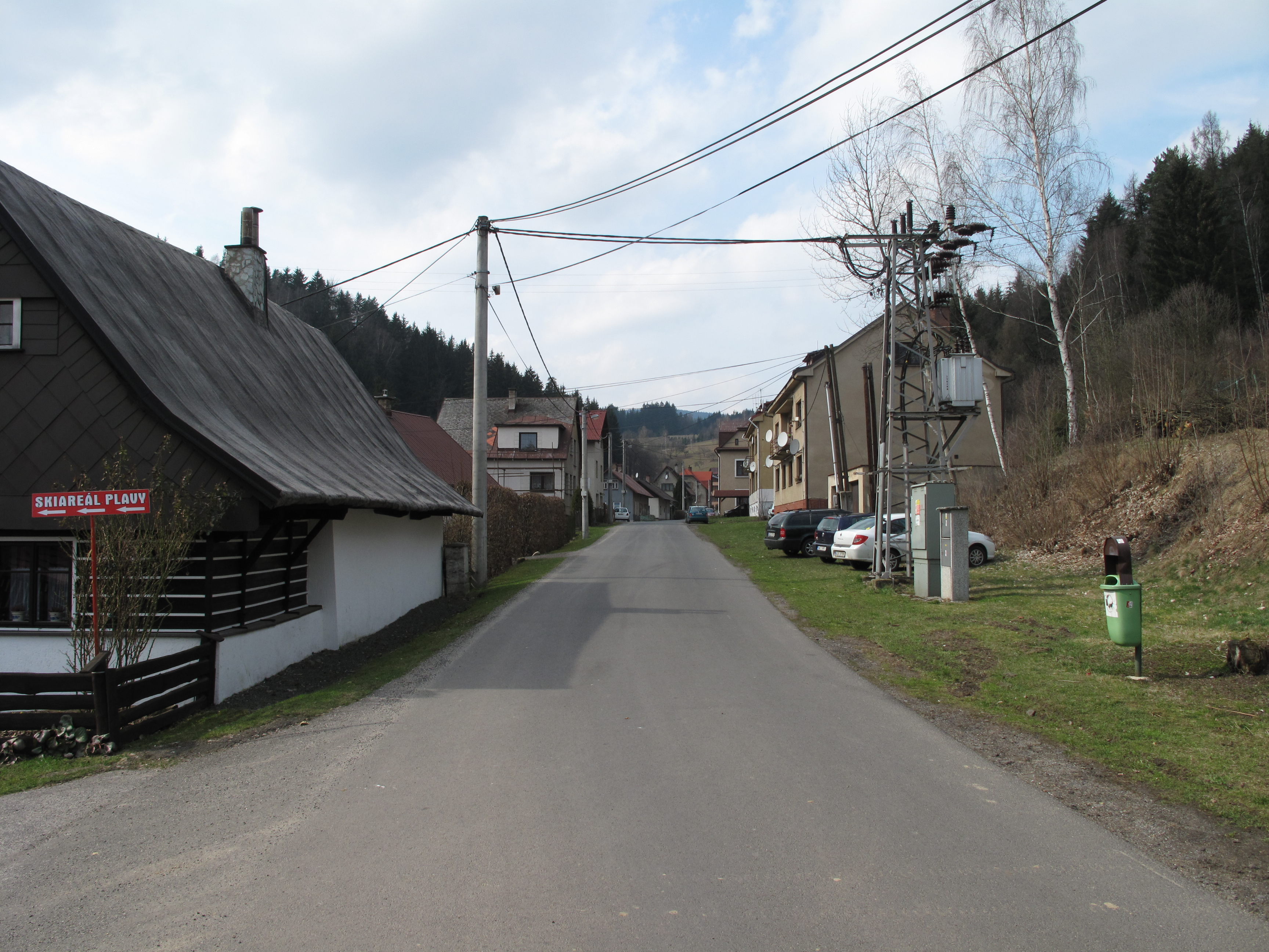 Silnice v Plavech. Okres Jablonec nad Nisou, Česká republika.